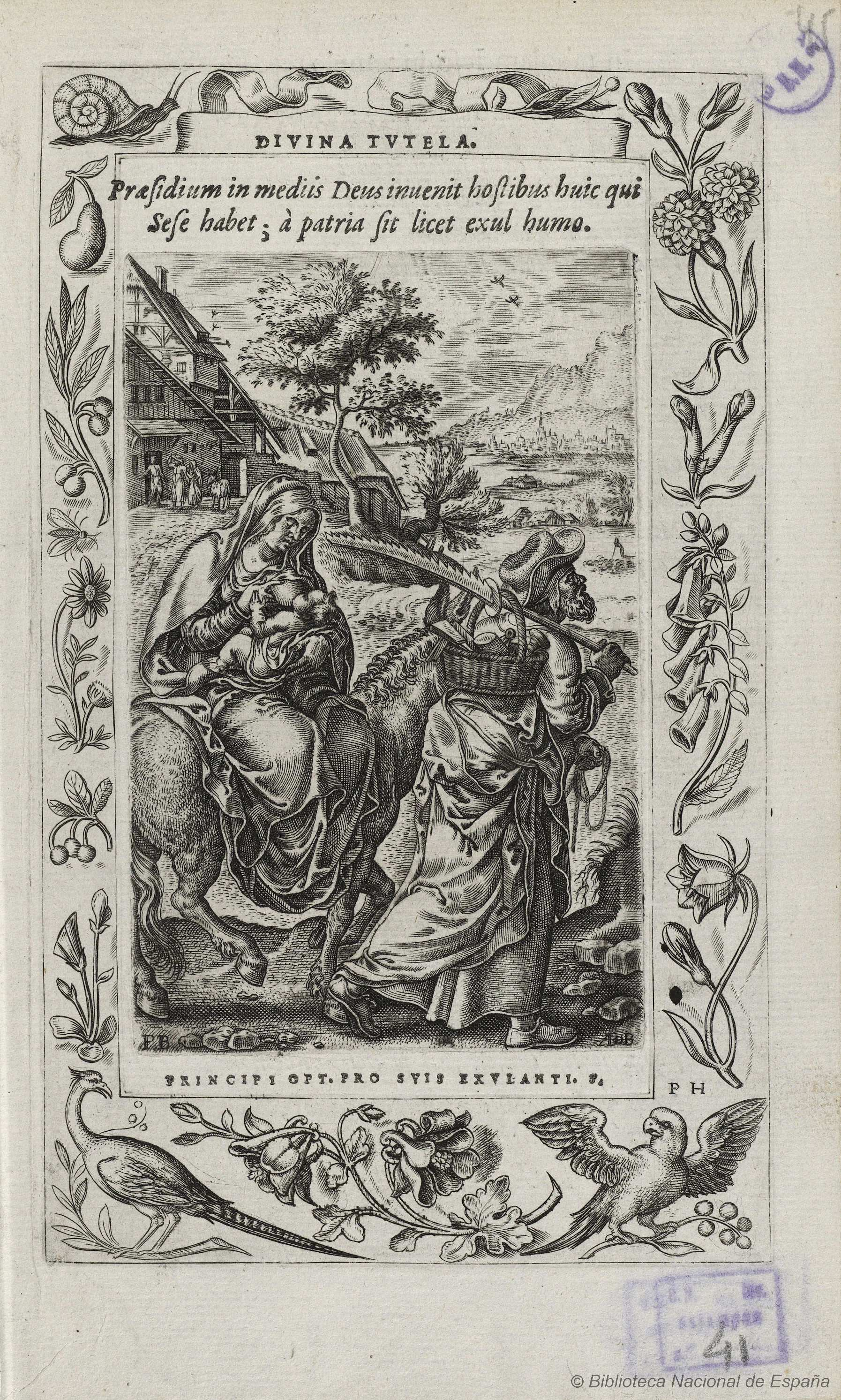 Humanae salutis monumenta, Amberes, Cristóbal Plantino, prototipógrafo regio, 1571. Grabado de Abraham de Bruyn por dibujo de Pieter van der Borcht